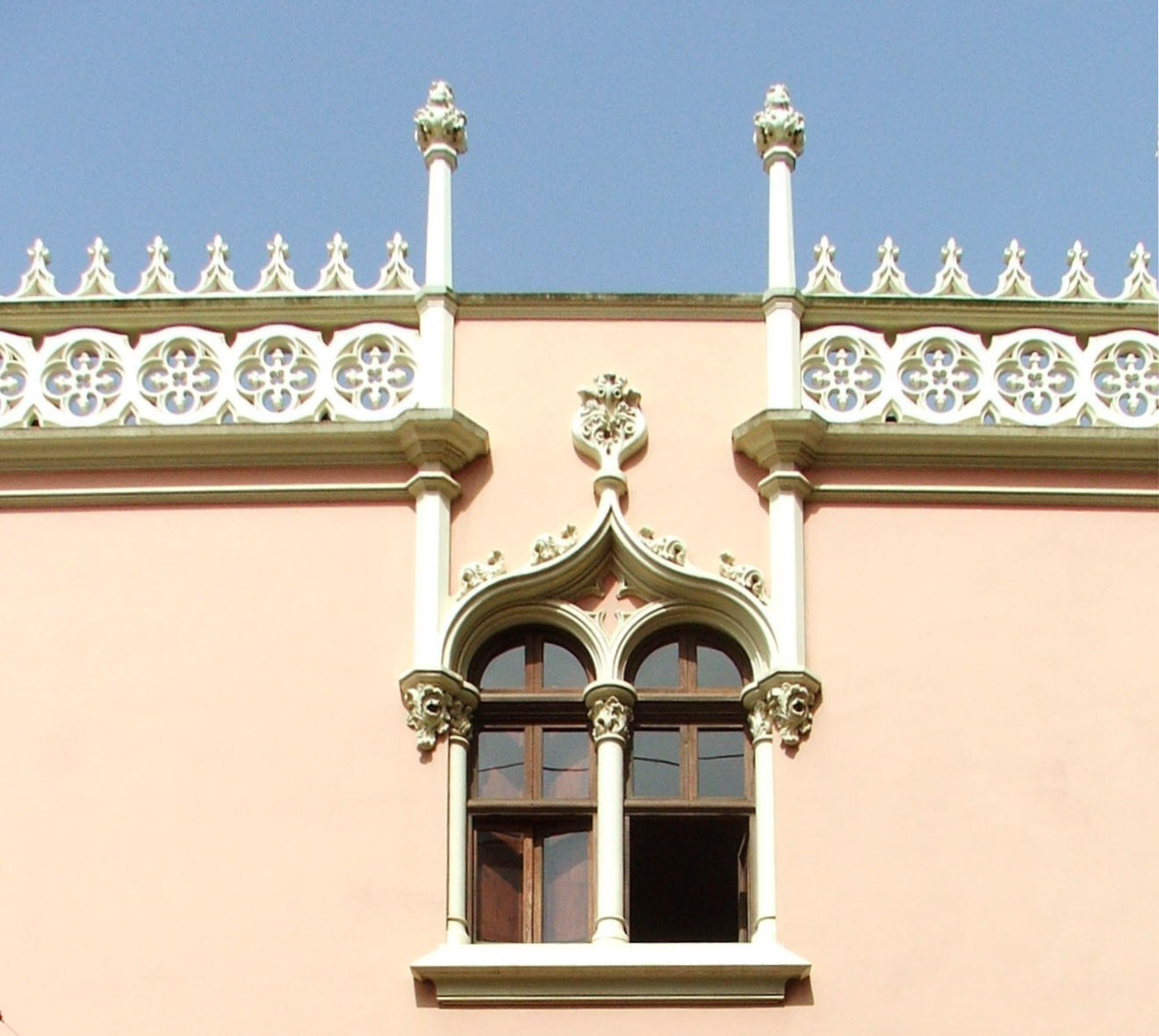 Antiguo Colegio de las Dominicas La Laguna